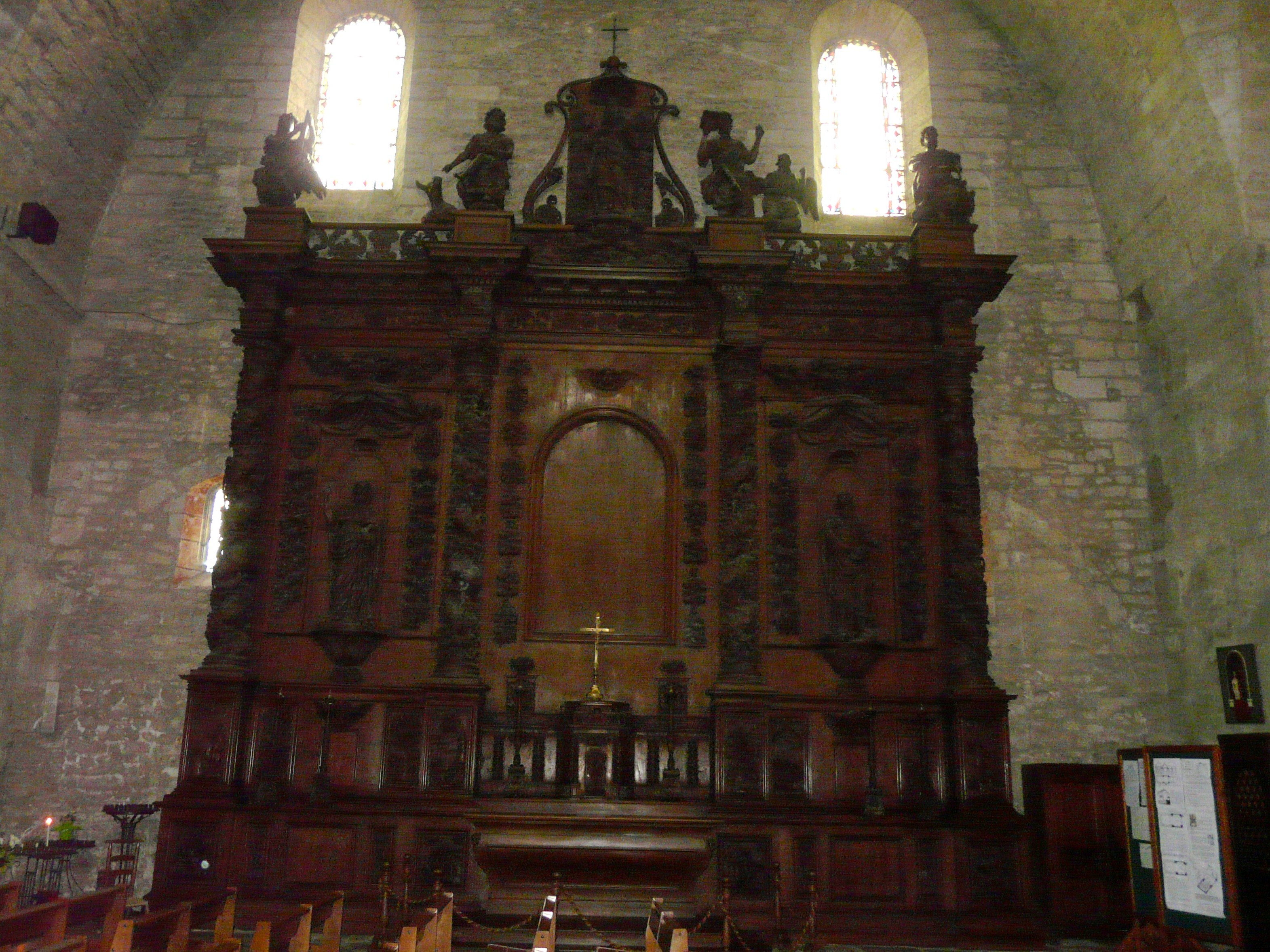 Le retable de l'église Saint-Étienne-de-la-Cité, Périgueux, Dordogne, France.